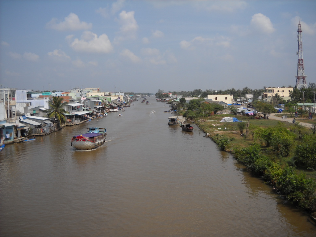 Thị trấn Vĩnh Thuận, Kiên Giang